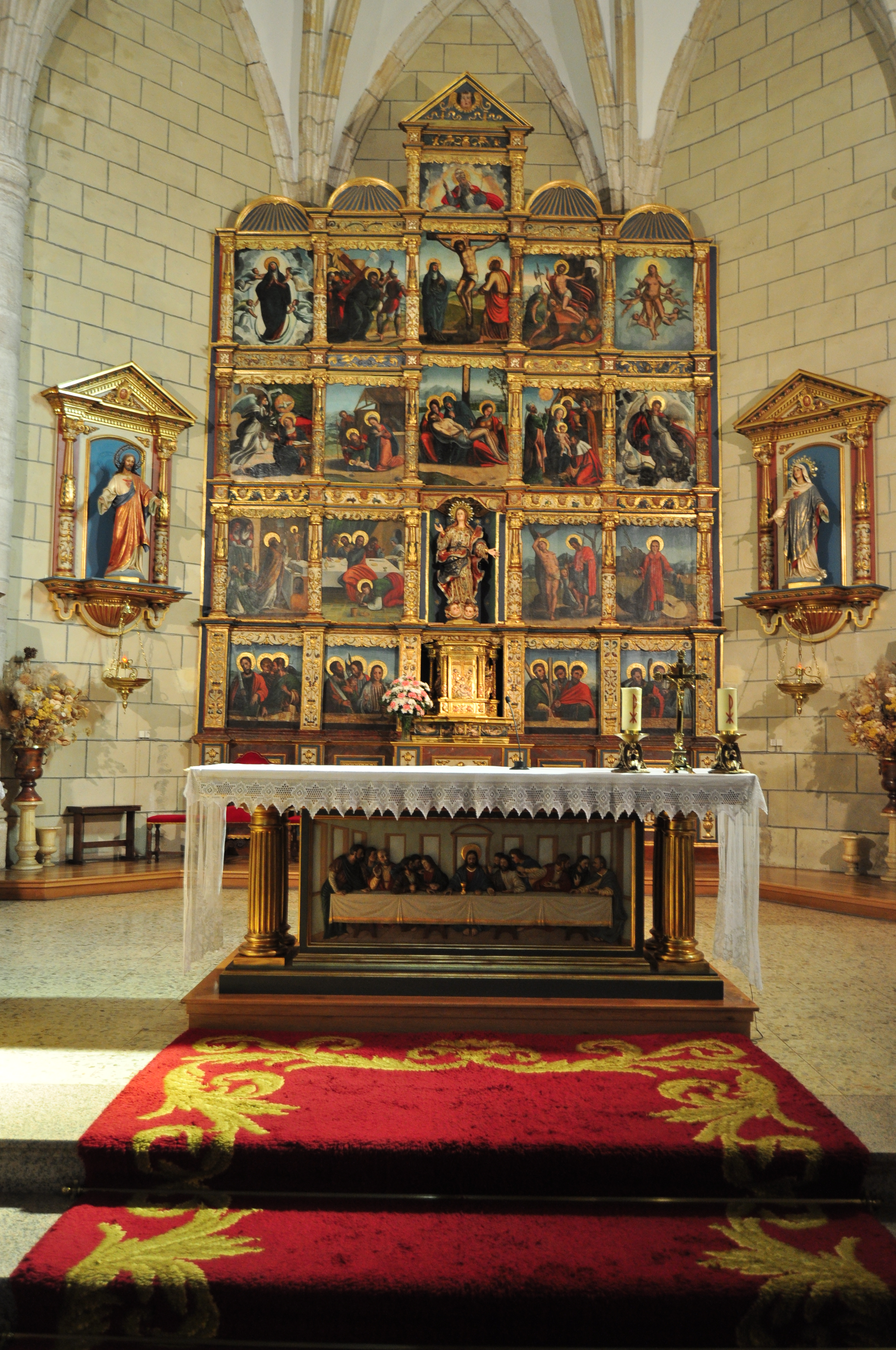 Trillo - 011